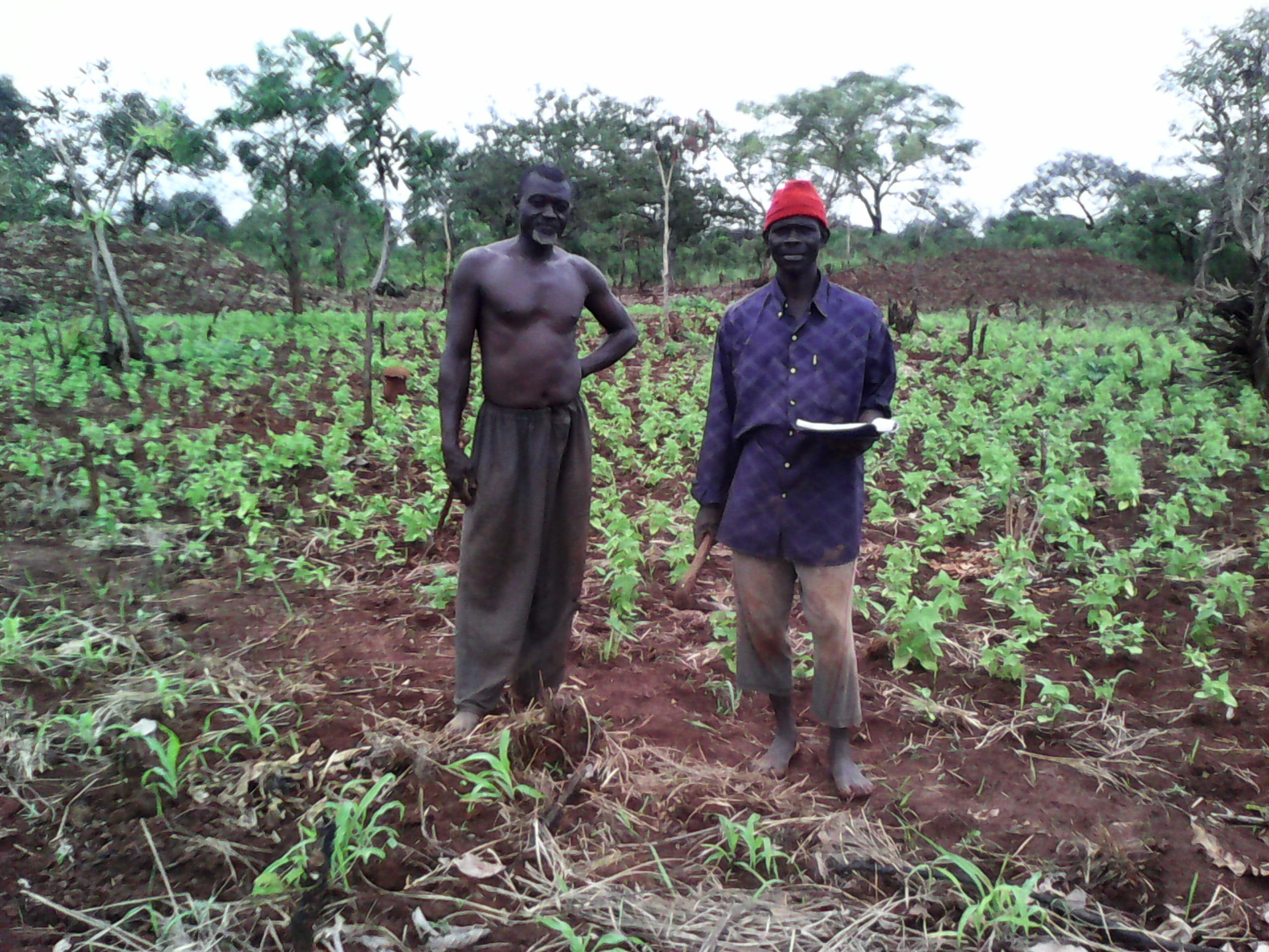 parcelles semencières de haricot à Yaloké en Centrafrique This is an image of Cultural Fashion or Adornment from Central African Republic